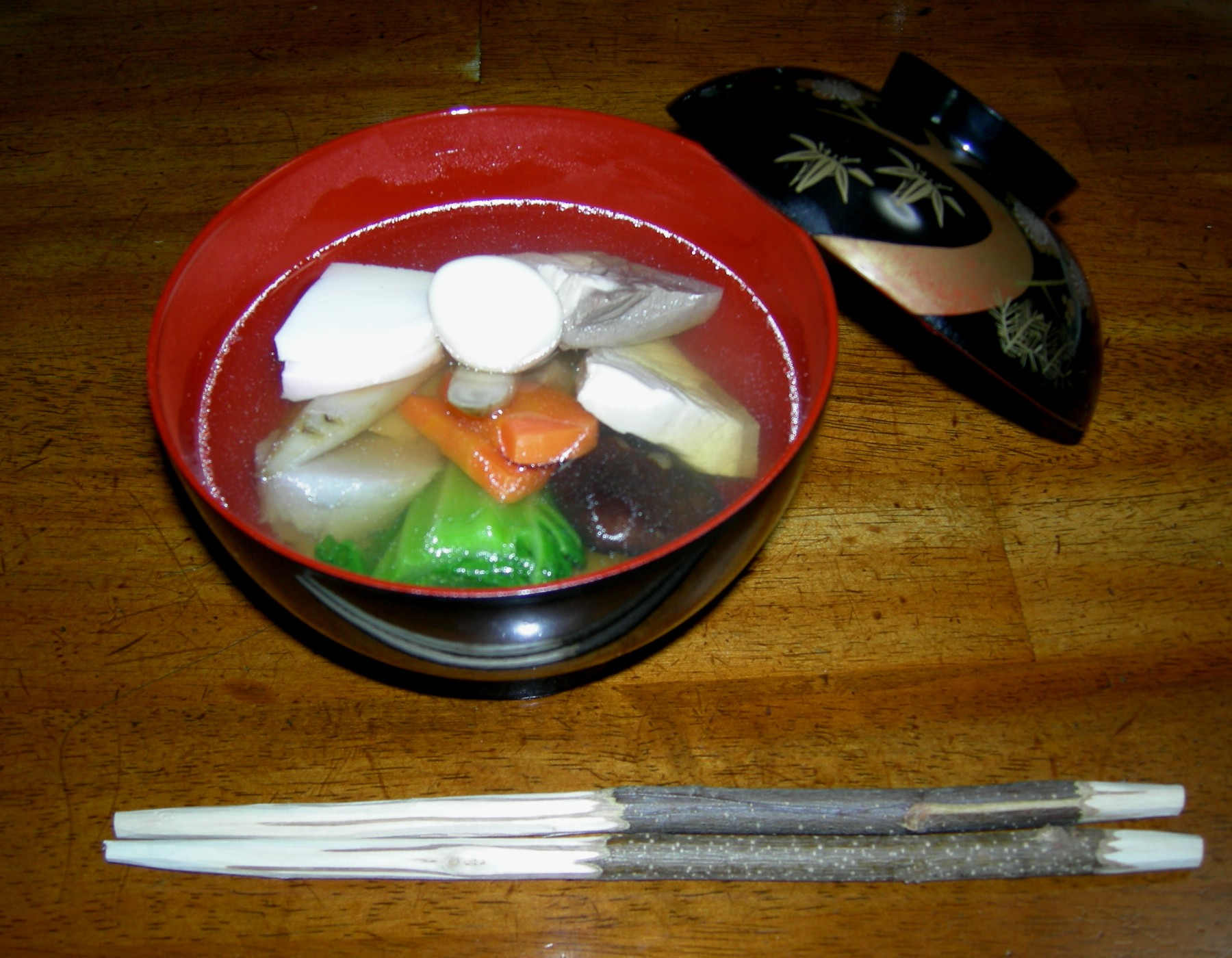 博多雑煮 : Zoni soup in Hakata (Fukuoka)